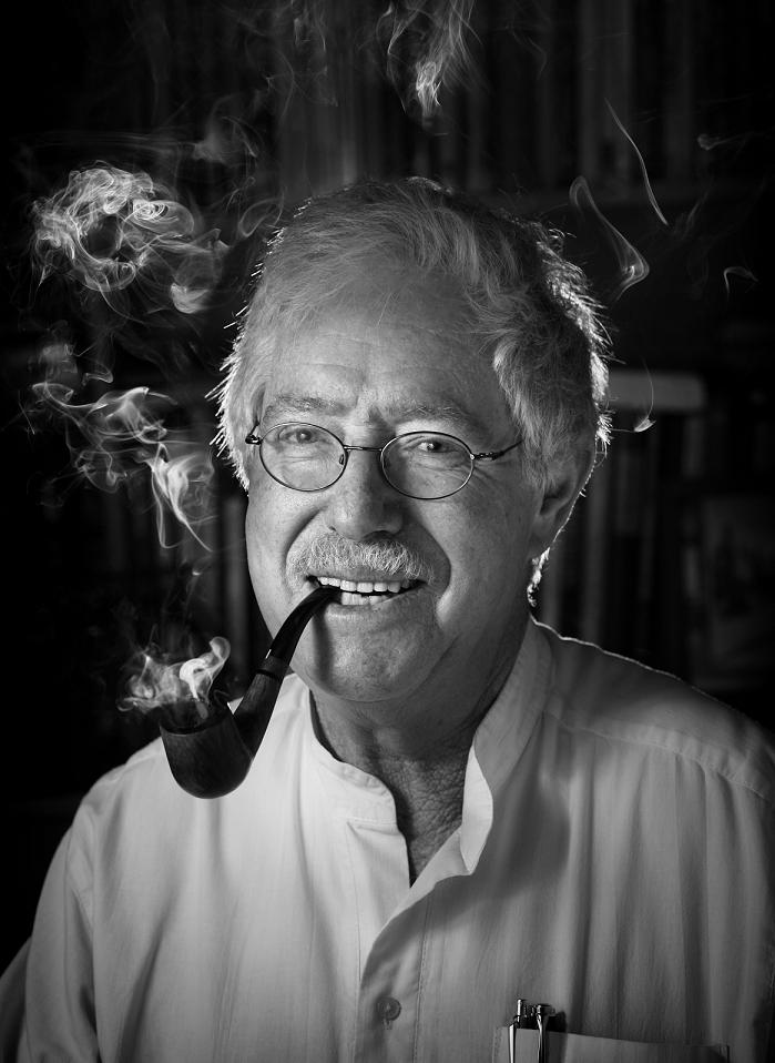 אורי אברמסון